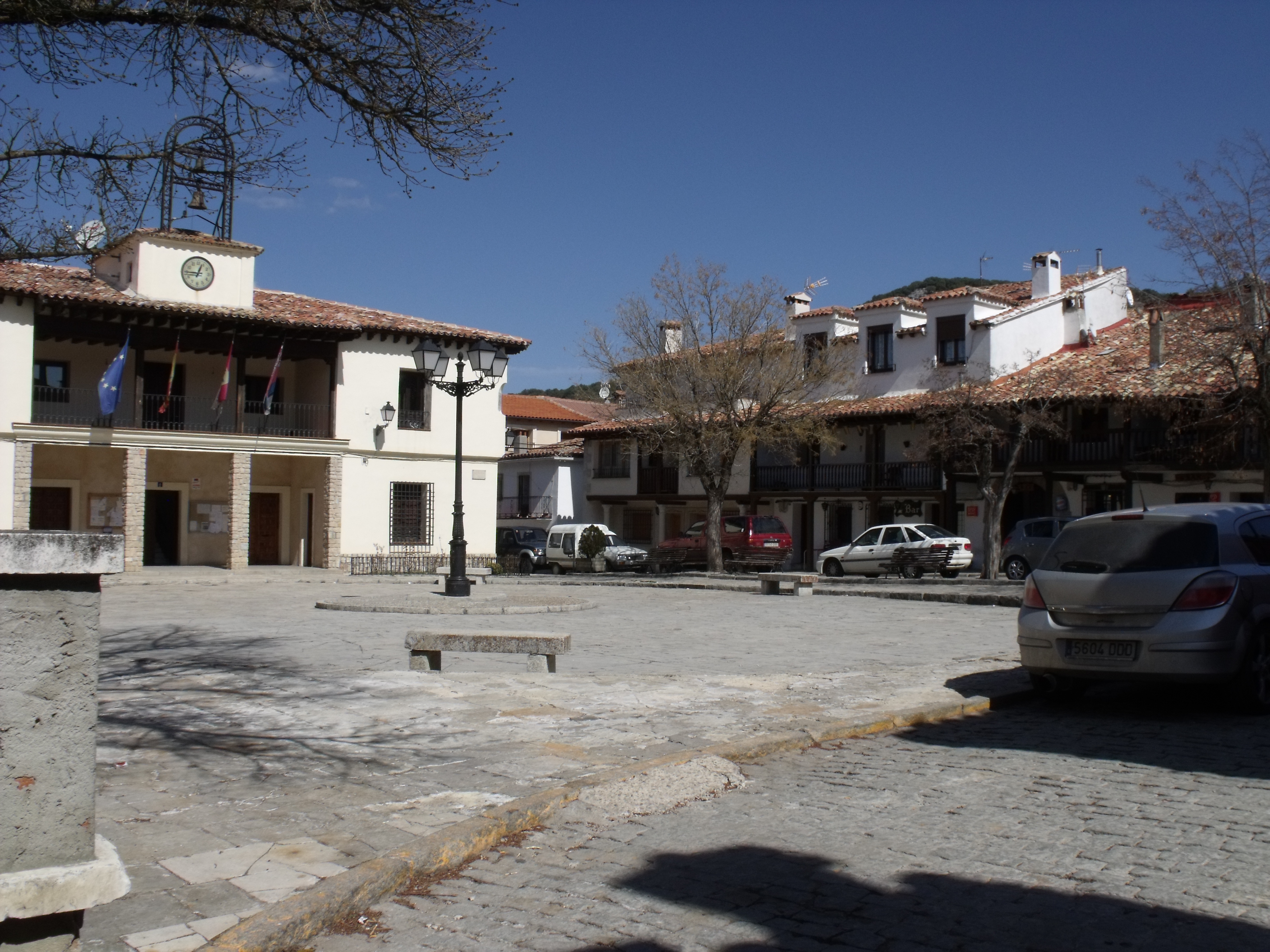 Beteta